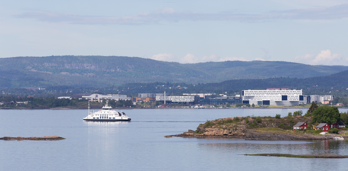 MS Dronningen på vei mot Nesodden i rute B10 fra Aker Brygge. I forgrunnen hytteøyen Lindøya og i bakgrunnen Fornebulandet med Statoilbygget.